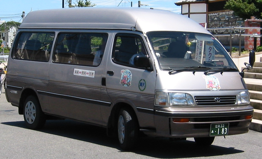 橋間自動車（通称：天満タクシー） 「あいのりタクシー」（佐賀県）の車両